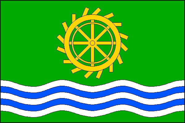 Vlajka obce Plavy